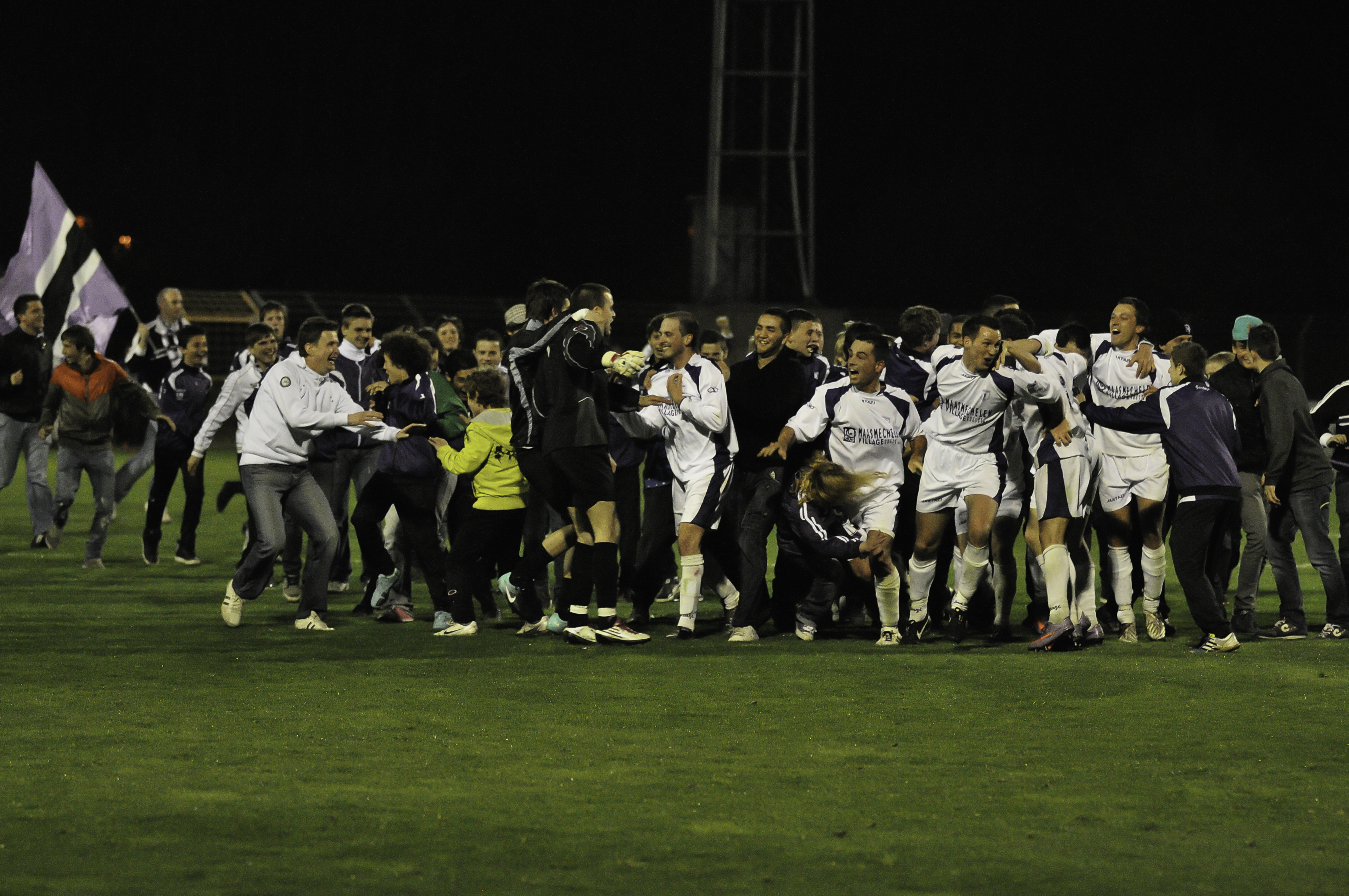 Patro Eisden Maasmechelen, supporters en spelers na het einde van de wedstrijd tegen Leopoldsburg, gewonnen met 1-0 waardoor Patro de titel behaalde in het seizoen 2010-2011